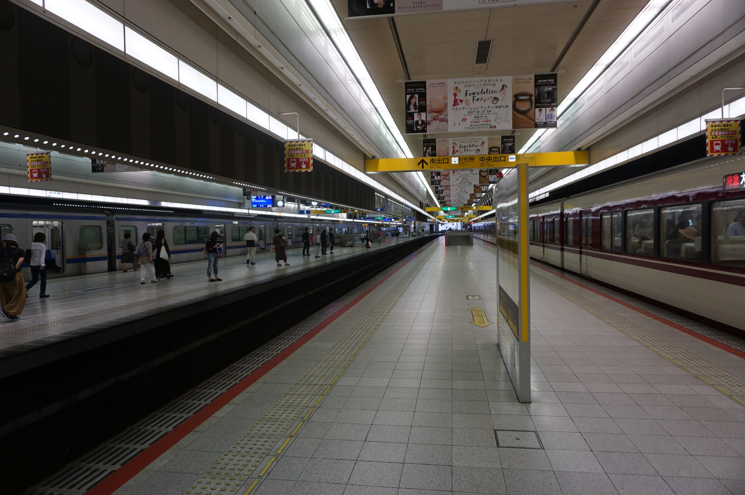 天神大牟田線のホーム